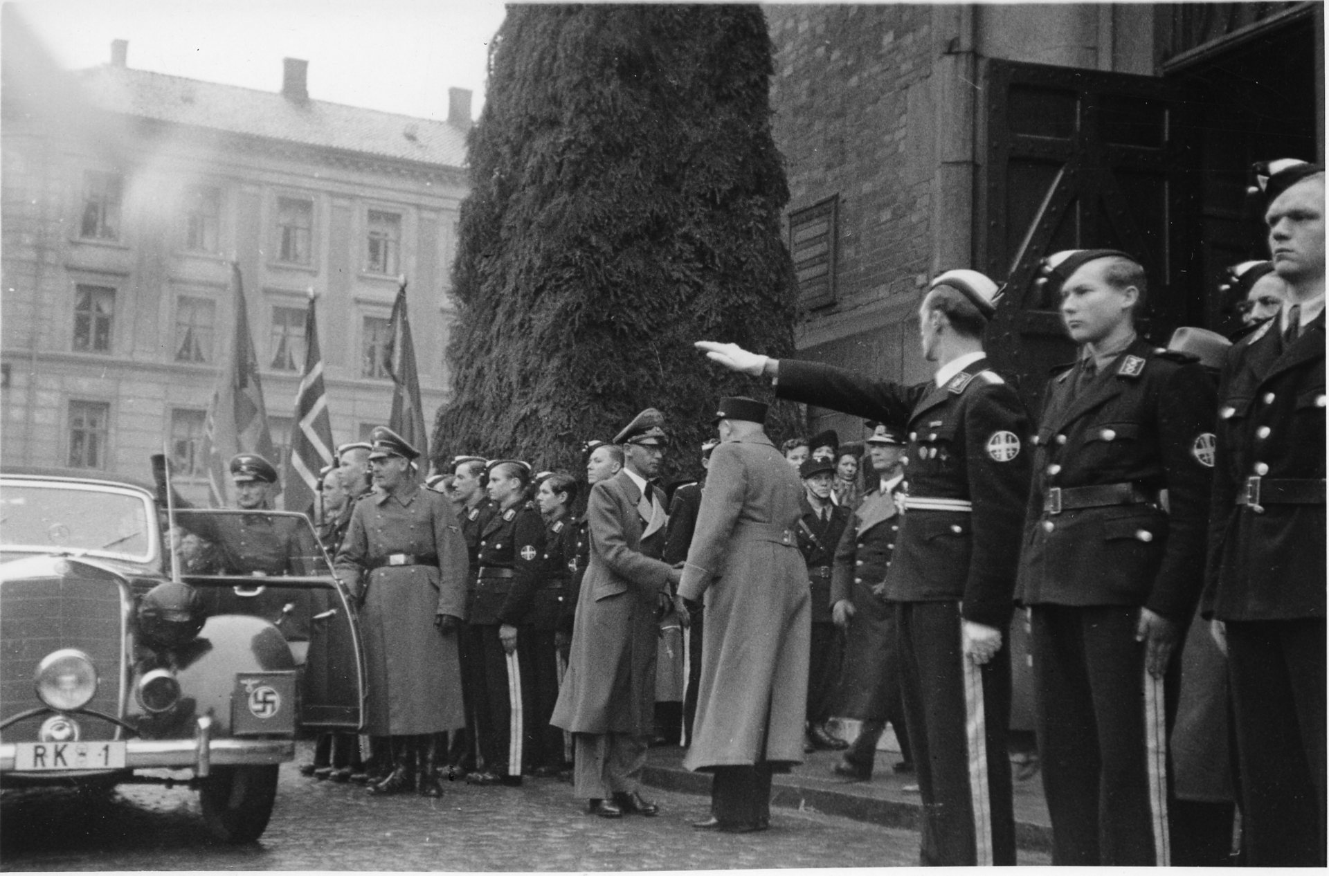 Utenfor Trefoldighet kirke. 1942/11/01. RA/RAFA-3309/U 41B/14 /14-20 img358 Nasjonal Samling, forkortet NS, var et norsk politisk parti som ble grunnlagt av Vidkun Quisling i 1933 og ble oppløst ved frigjøringa i 1945. Ideologisk fulgte partiet den tyske nasjonalsosialismen, og NS ble støtteorganisasjon for den tyske okkupasjonsmakta i Norge under andre verdenskrig.